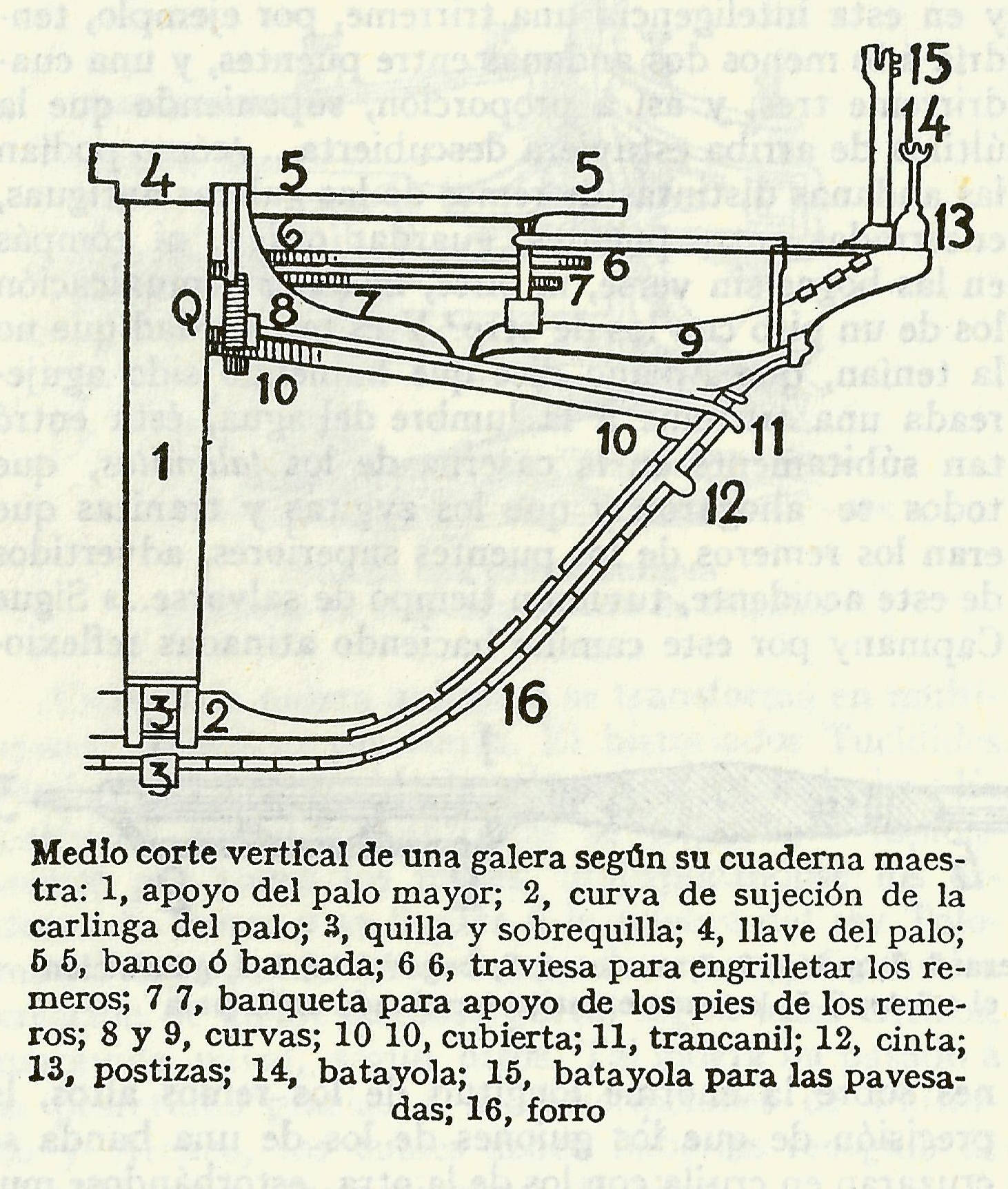 Esquema con la sección vertical de la cuaderna maestra de una galera, con el nombre de las principales partes que usualmente la componían.